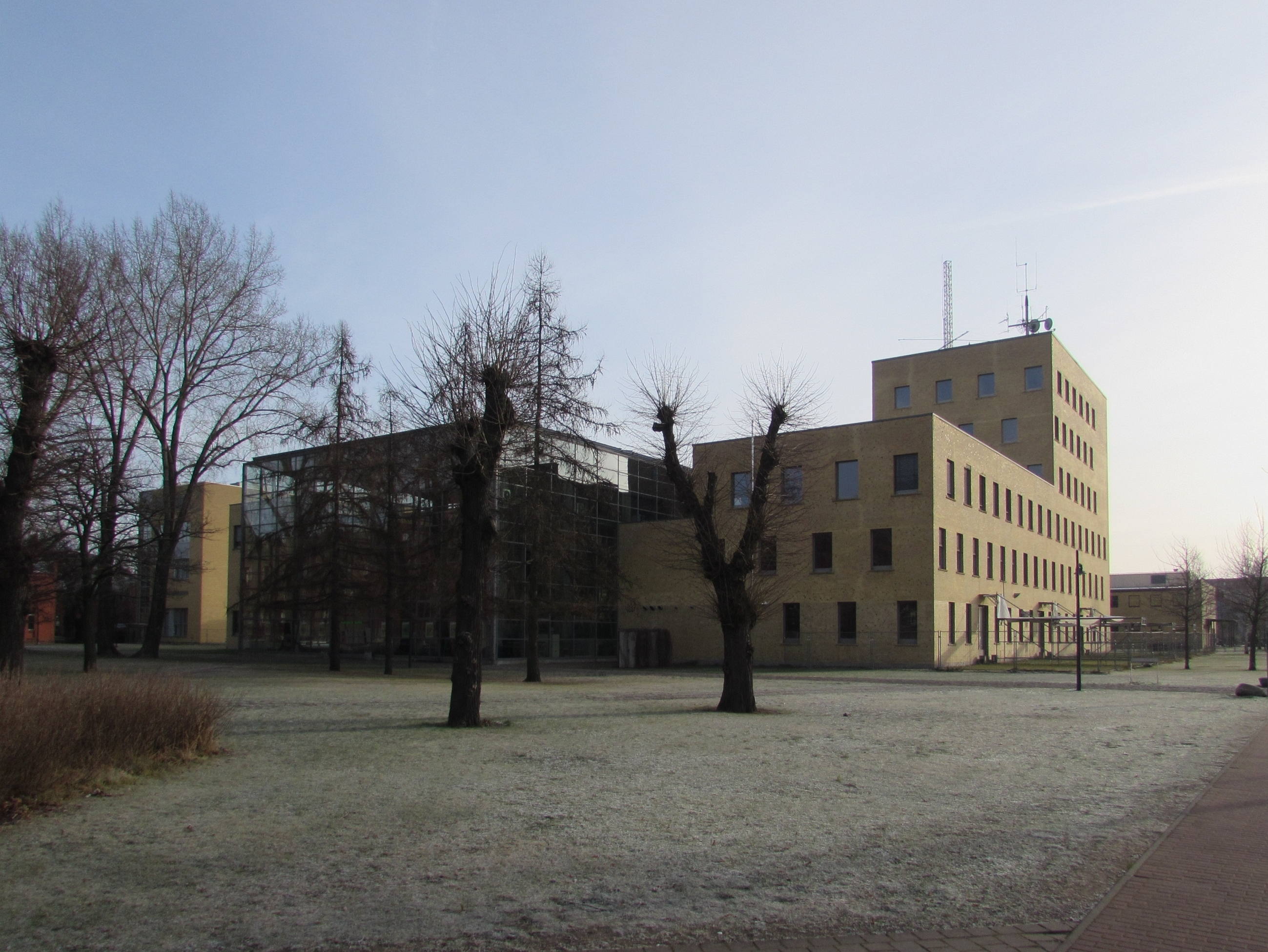 fh brandenburg fachbereich technik